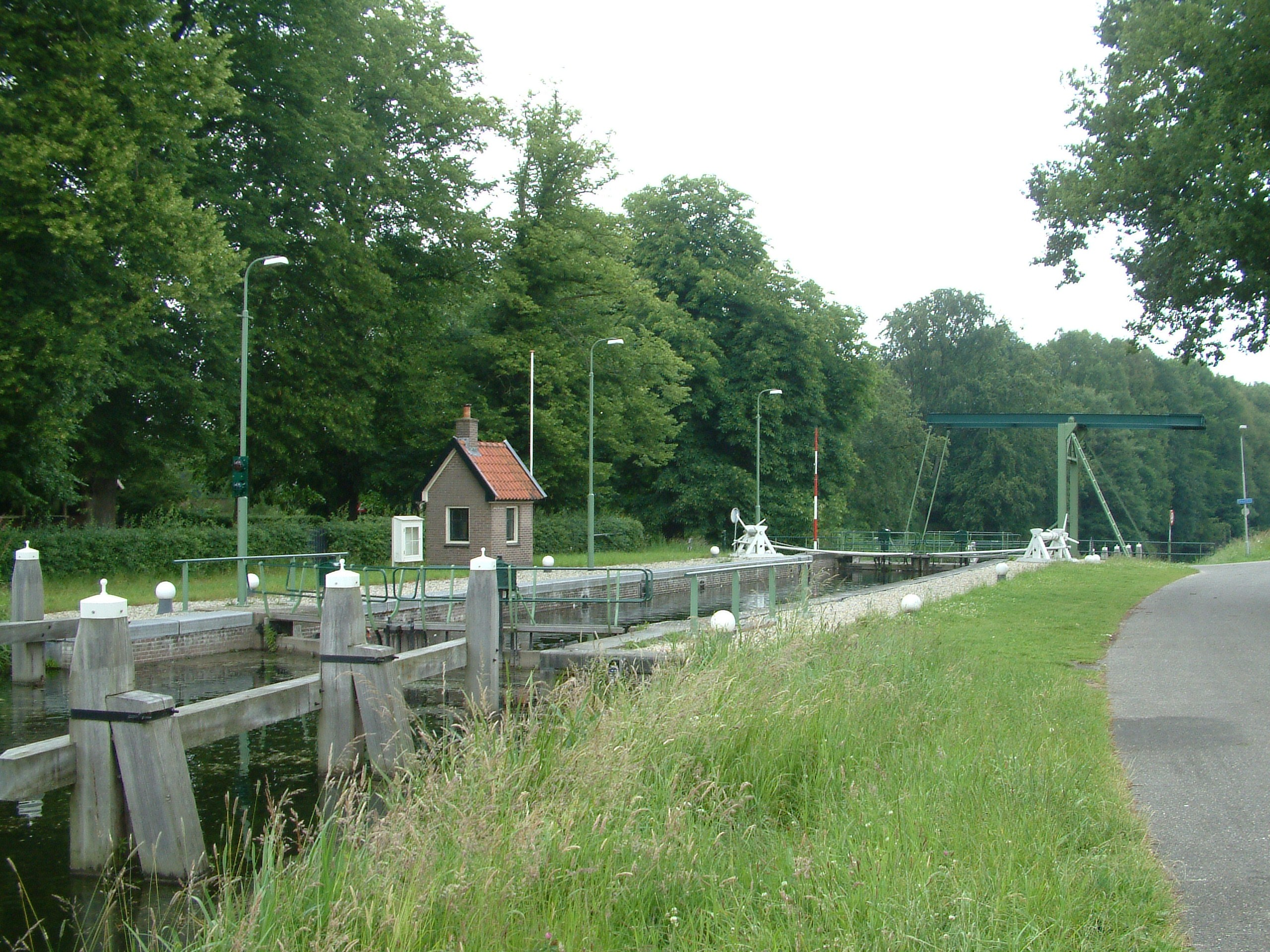 Sluis in het Apeldoorns kanaal van Dieren naar Hattem